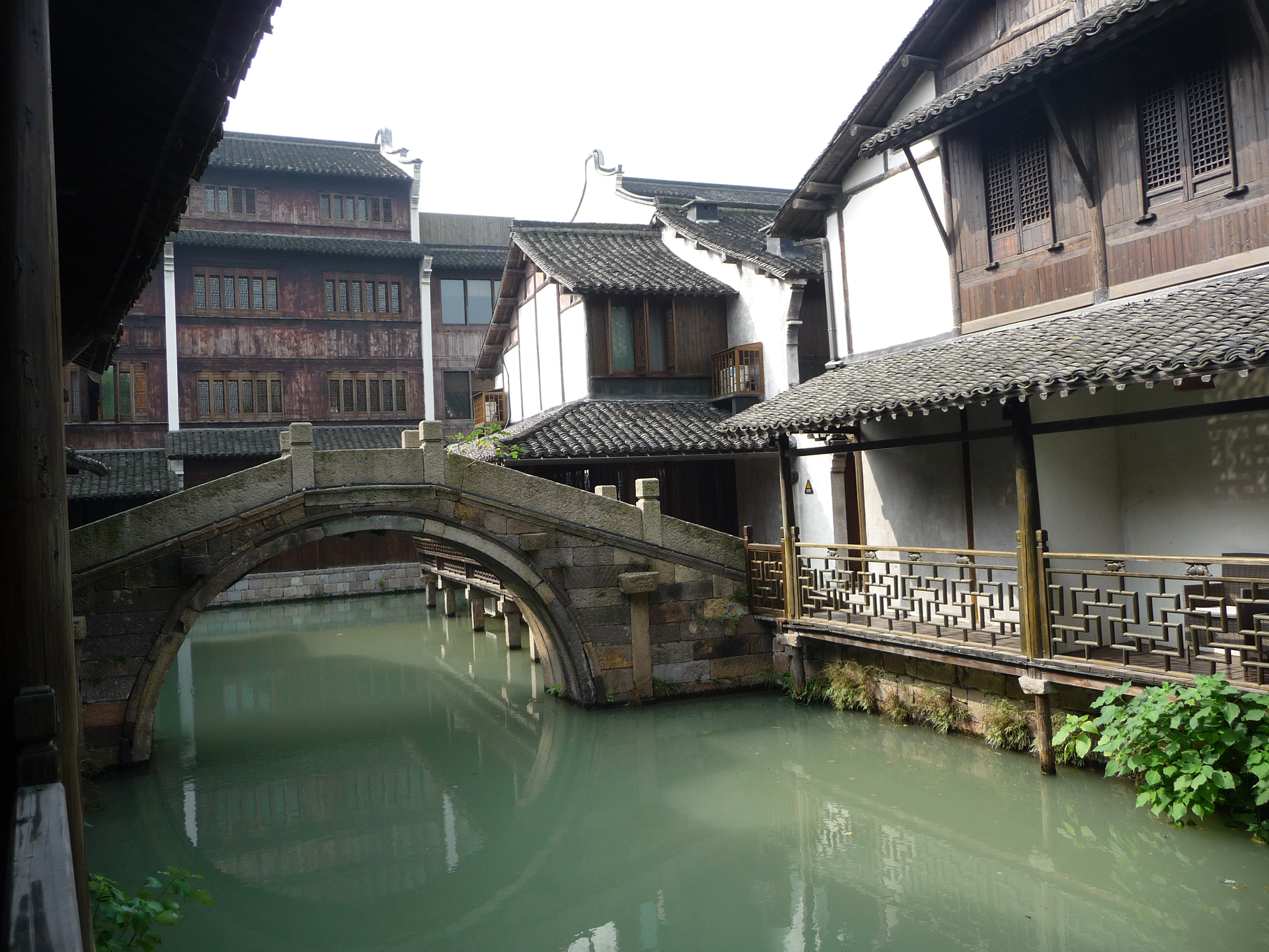 Brücke im ostchinesischen Touristenstädchen Wuzhen, Provinz Zhejiang